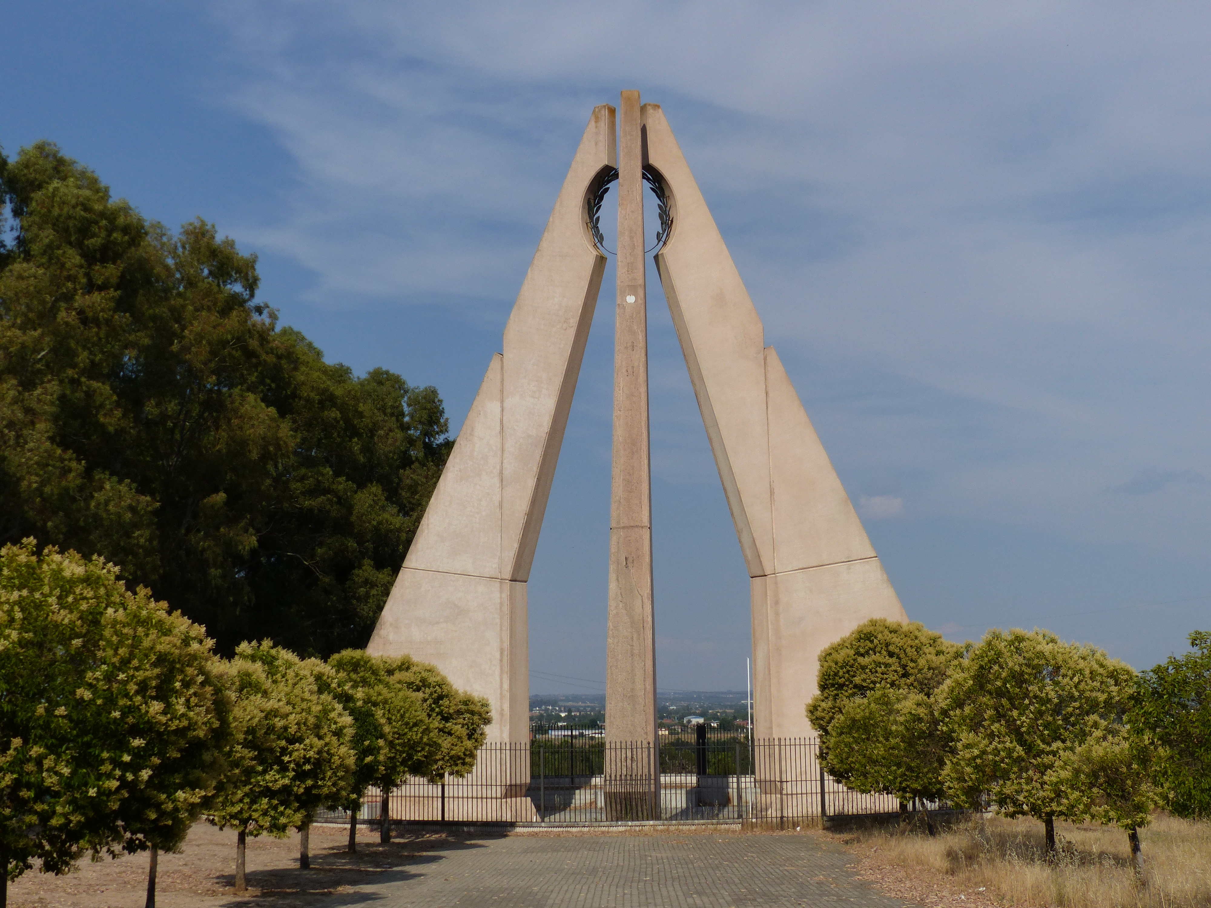 Monumento a la Batalla de Talavera, Toledo